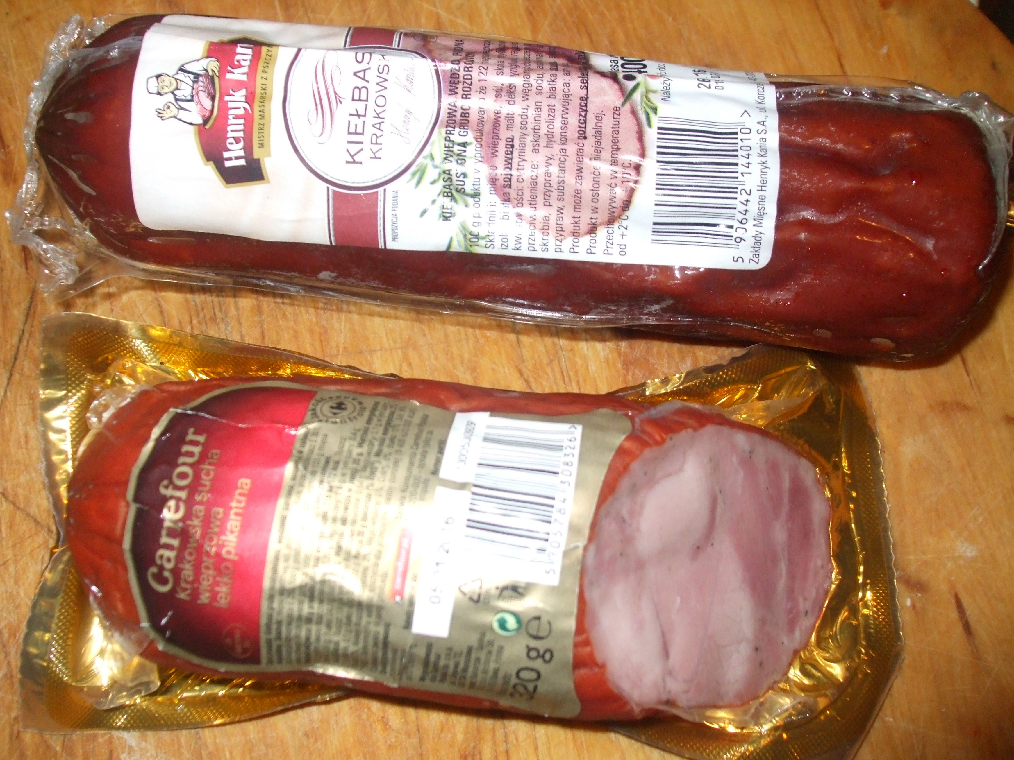 2 сорта краковских колбас (польского производства)